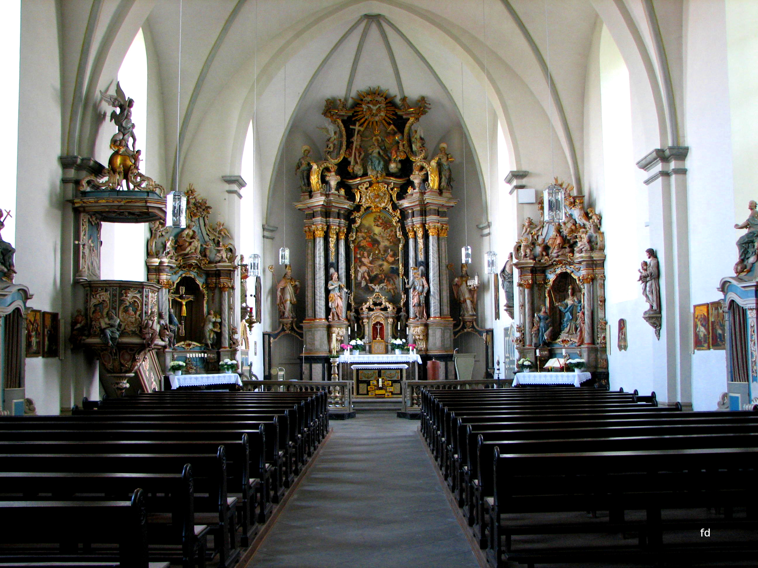 Altenrüthen Kirche Innenraum Rokoko, Rokoko Ausstattung 1669 von Johann Theodor Axer und Johann Stratnann.